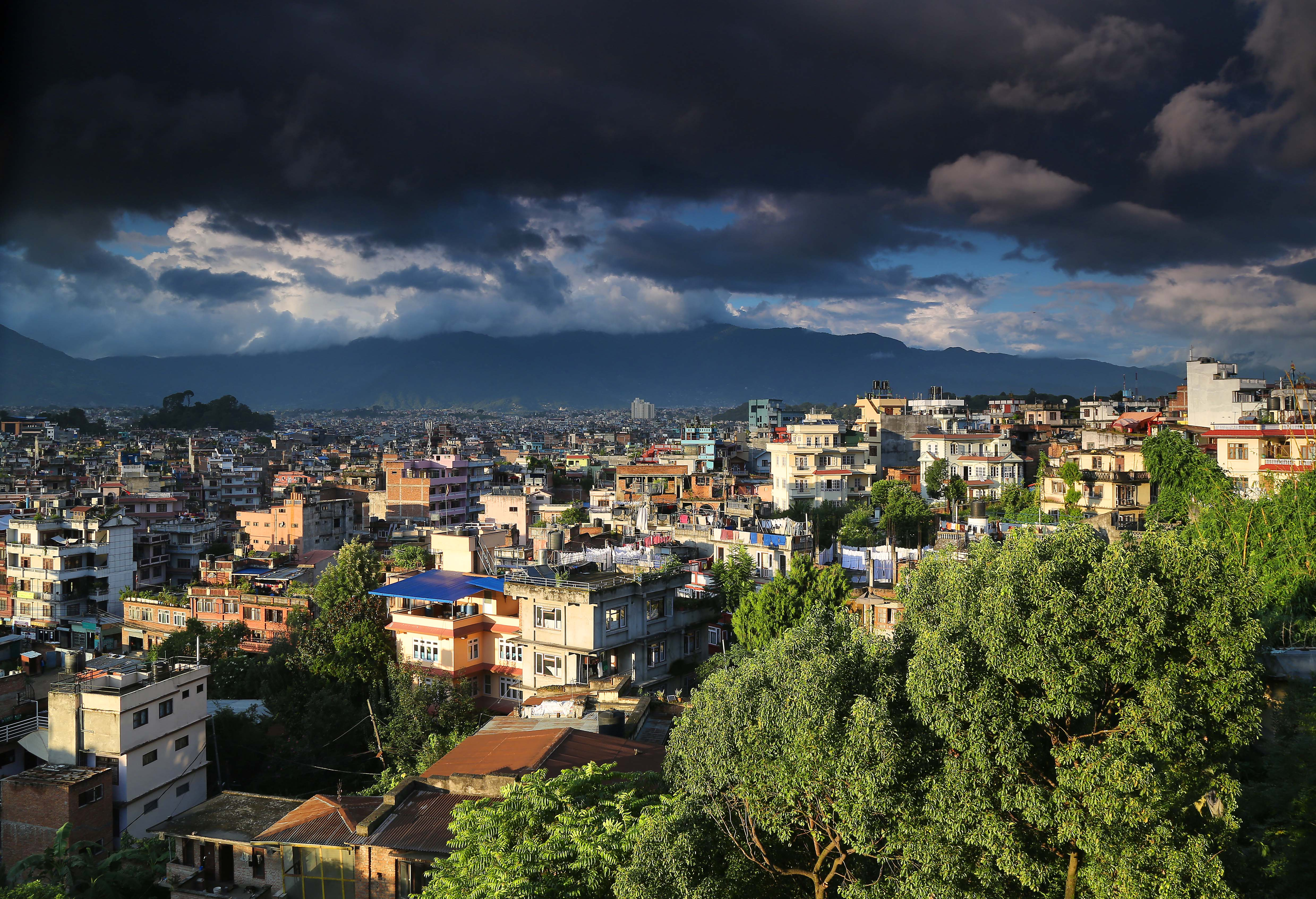 Kathmandu im Monsunl